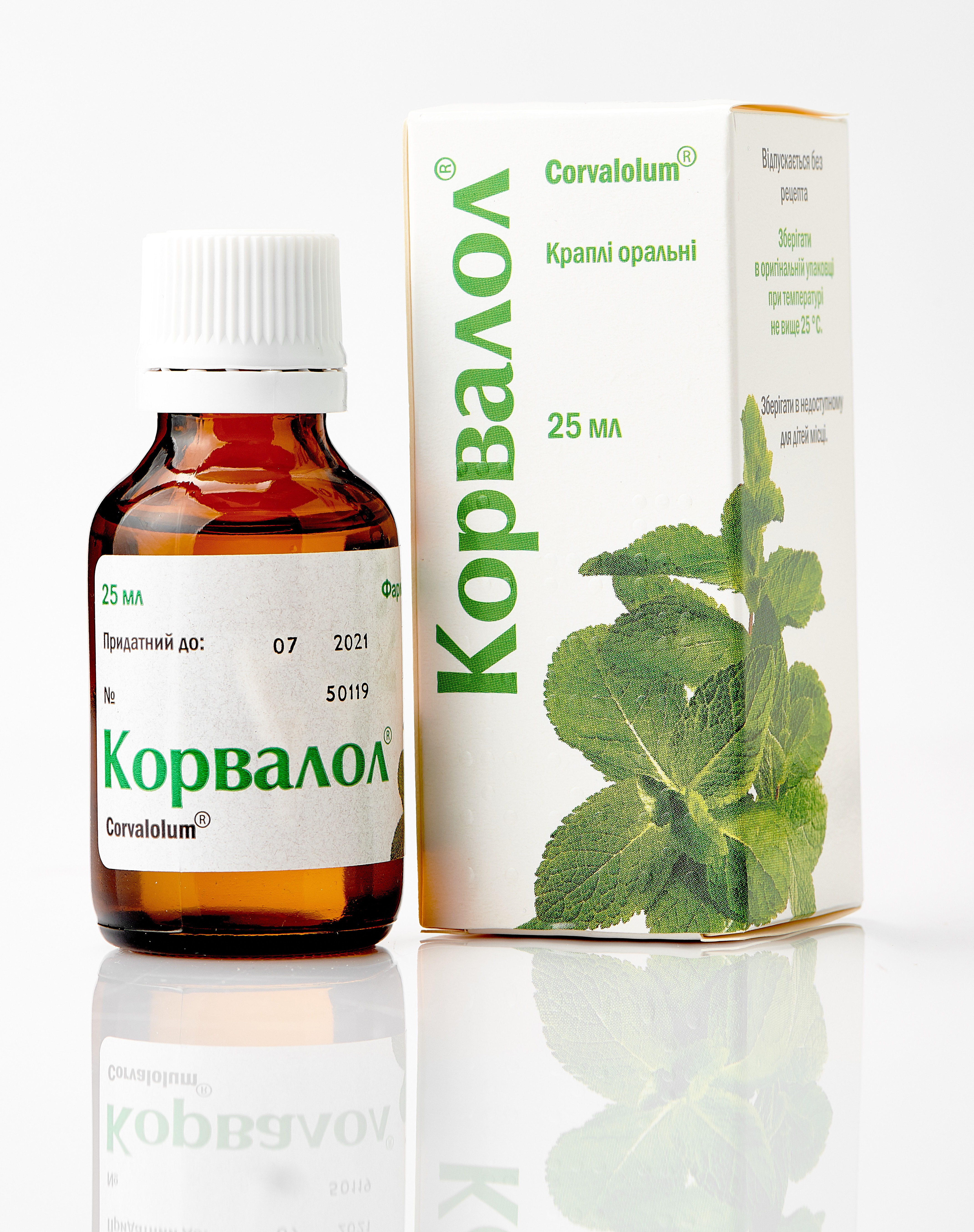 Корвалол